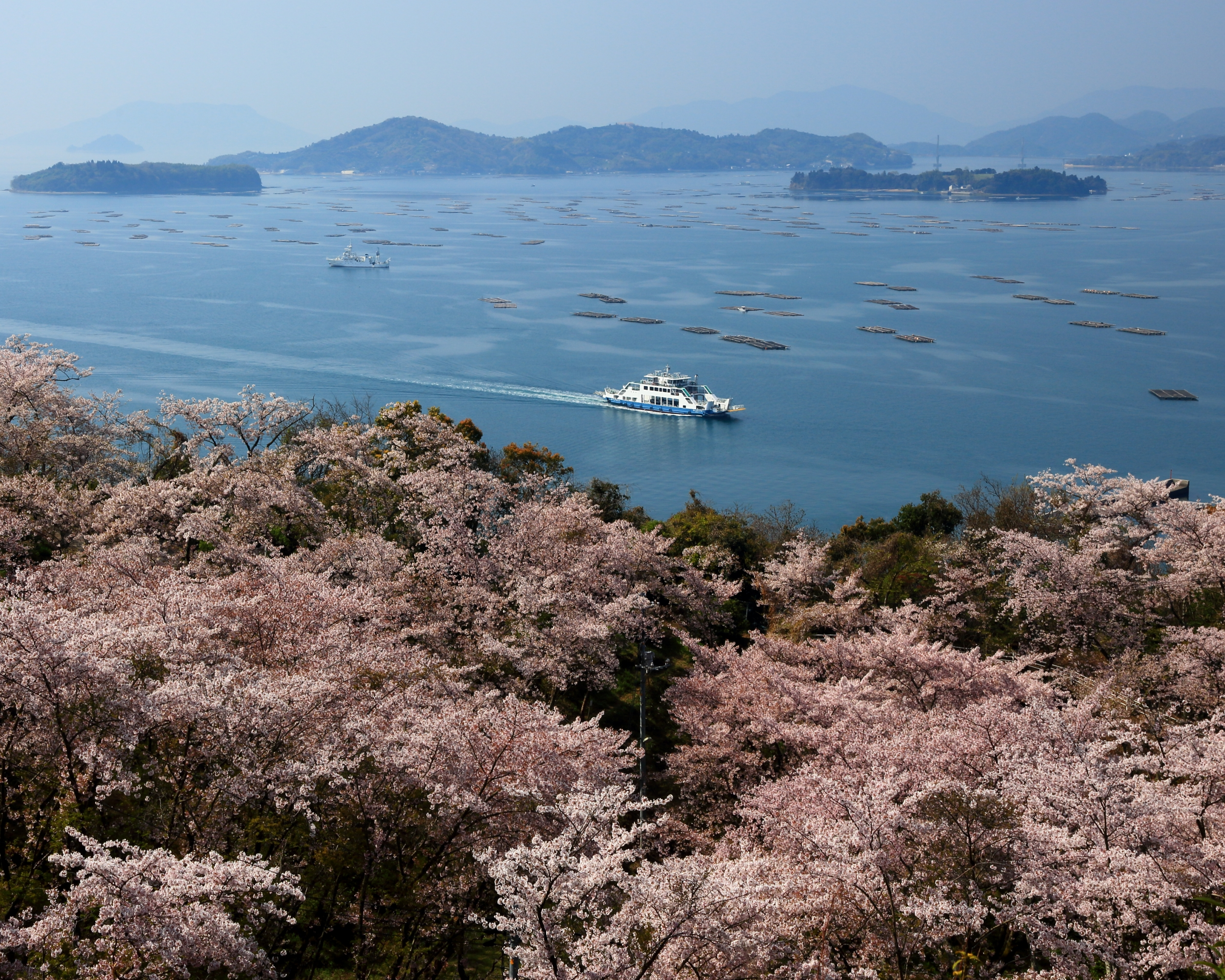 広島県東広島市正福寺山公園